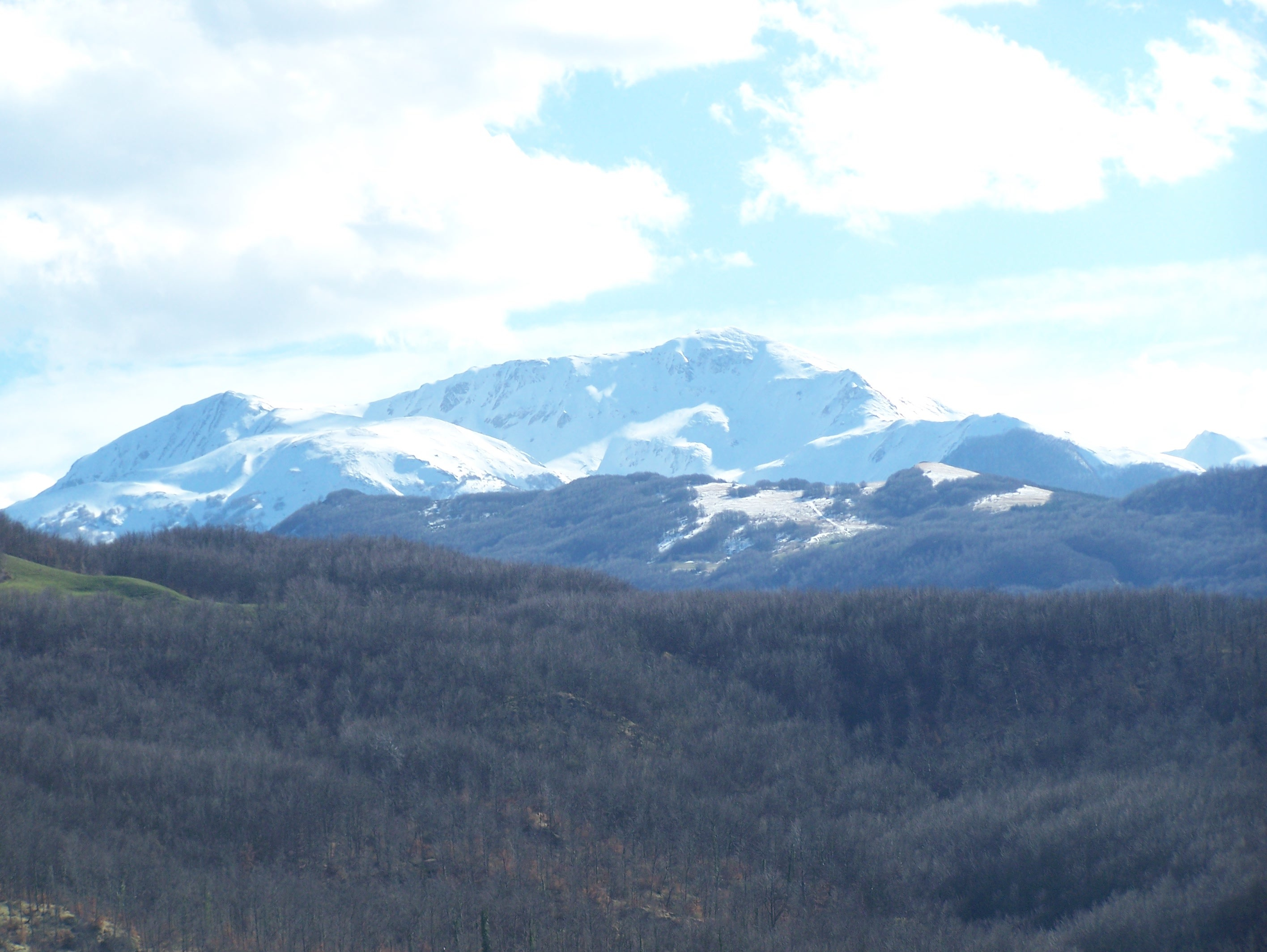 panorama dell'Alpe di Succiso; versante nord visto dalla Valdenza in primavera.